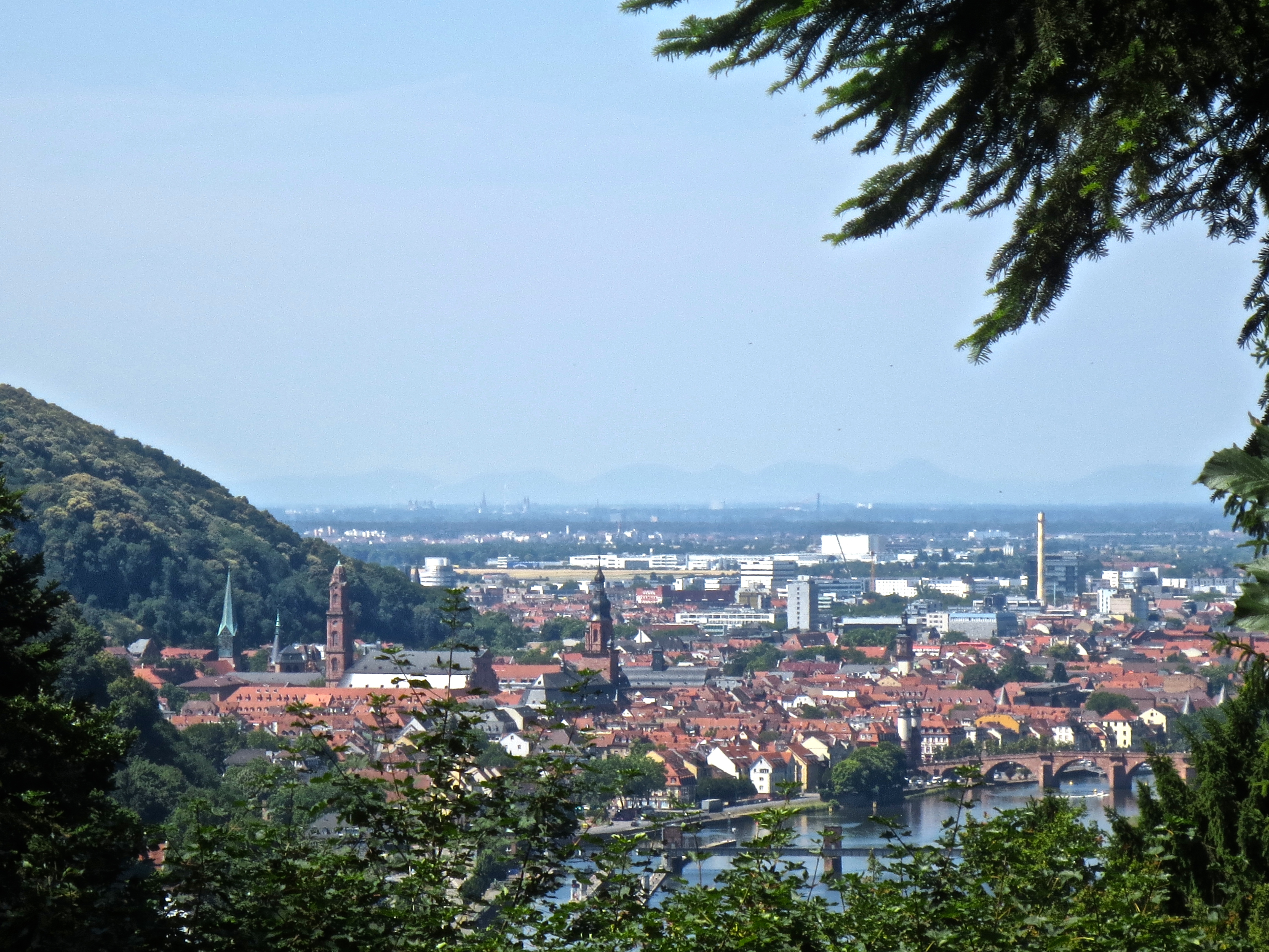 Heidelberg Panorama von der Heidelberger Altstadt über den Gaisberg bis zu den Vogesen, jenseits der Rheinebene am Horizont, Aufnahme vom höchsten Punkt in Ziegelhausen